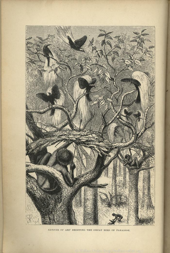 Великі райські птахи: Ілюстрація до книги "Малайський архіпелаг" (Т. 2) Альфреда Рассела Воллеса, на якій зображено великих райських птахів, на яких полюють аборигени